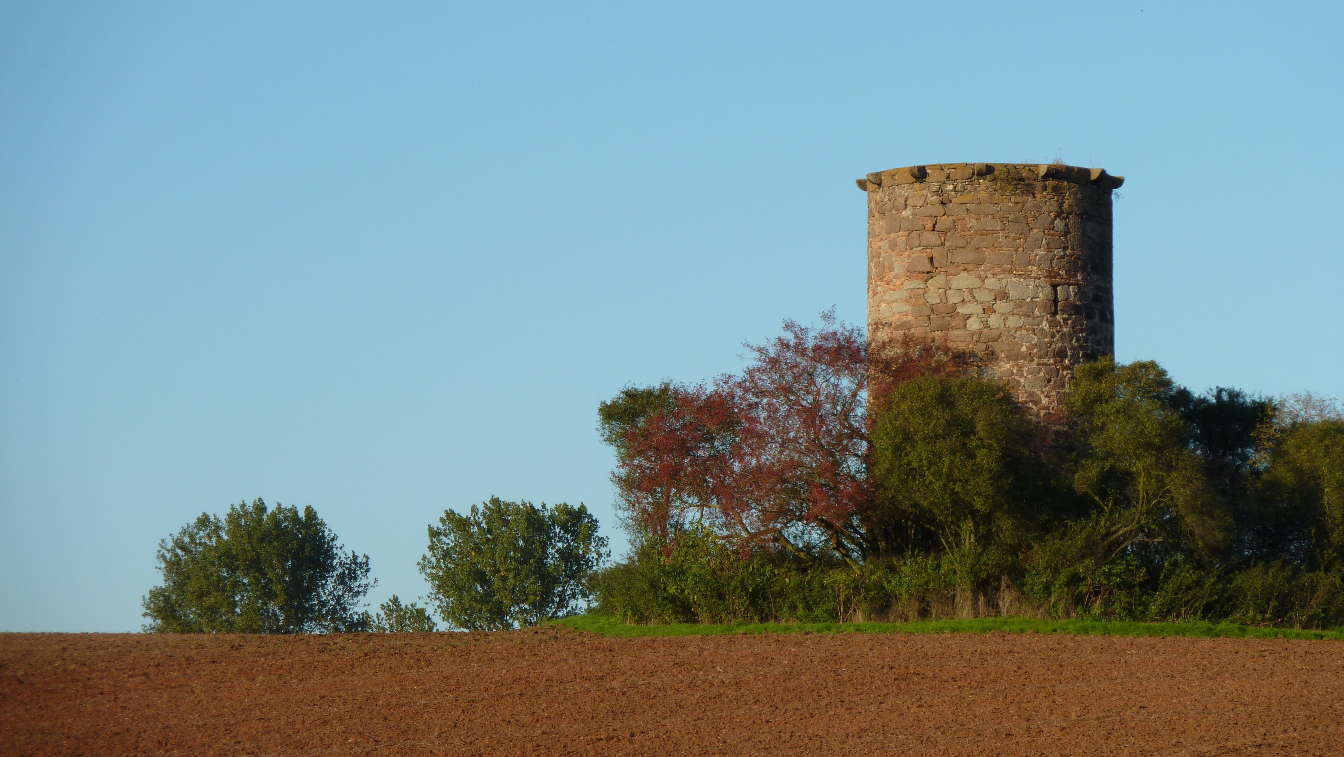 Rengelröder Warte im Leinetal zwischen Uder und Heiligenstadt. Erbaut um 1433 (Beleg